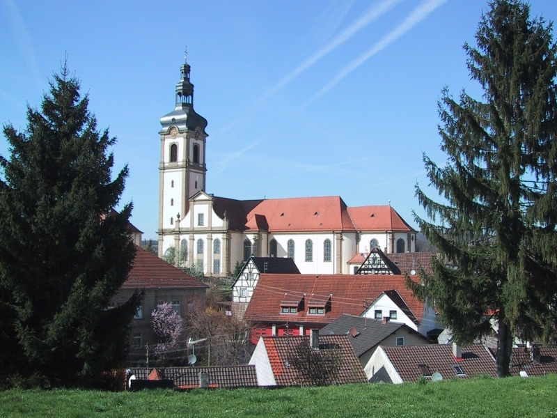 Katholische Kirche St. Michael Odenheim